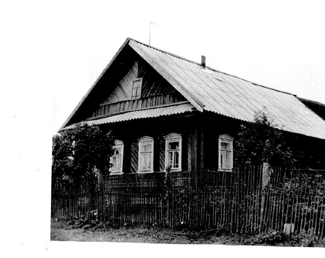 Изба Е. Копыльцовой